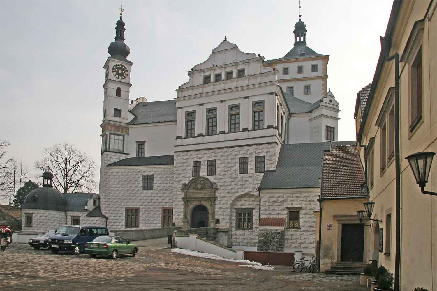 Pardubice Castle in Pardubice, Czech Republic